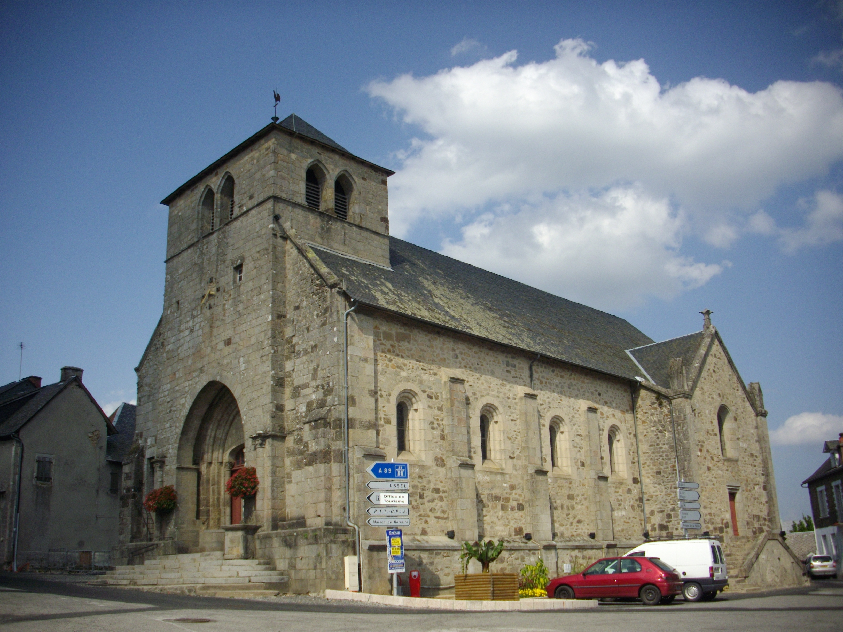 Église Saint-Étienne de Neuvic (Corrèze, France)